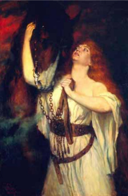 Rollenportrait Alice Guszalewicz als "Brünnhilde" mit Pferd "Grane" im "Ring des Nibelungen" (Wagner), datiert München 1912